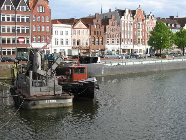 Motorschlepper Titan neben Eimerkettenbagger im Museumshafen zu Lübeck